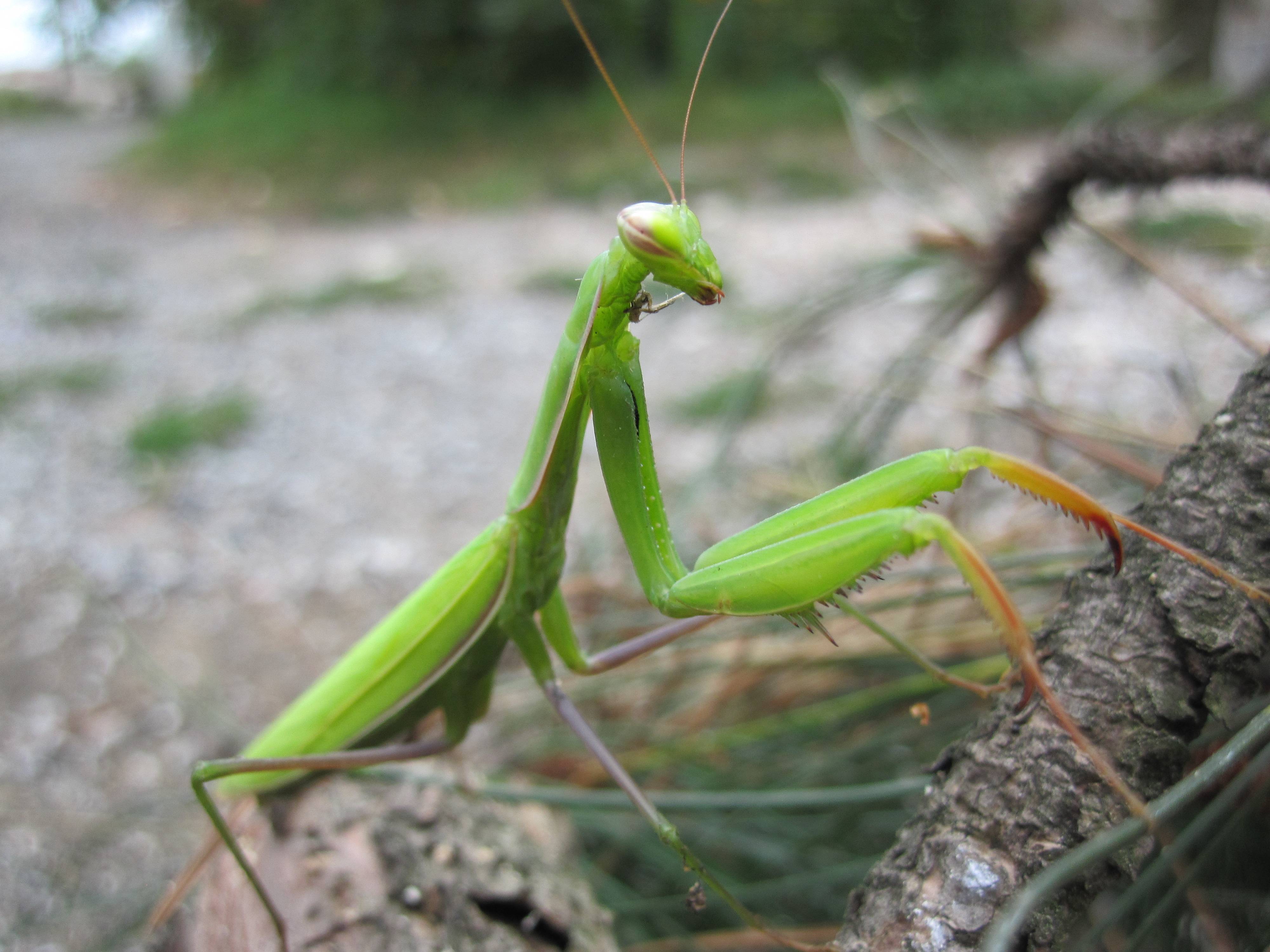 Богомолка (Mantis) во околината на с. Мажучиште, Прилеп.